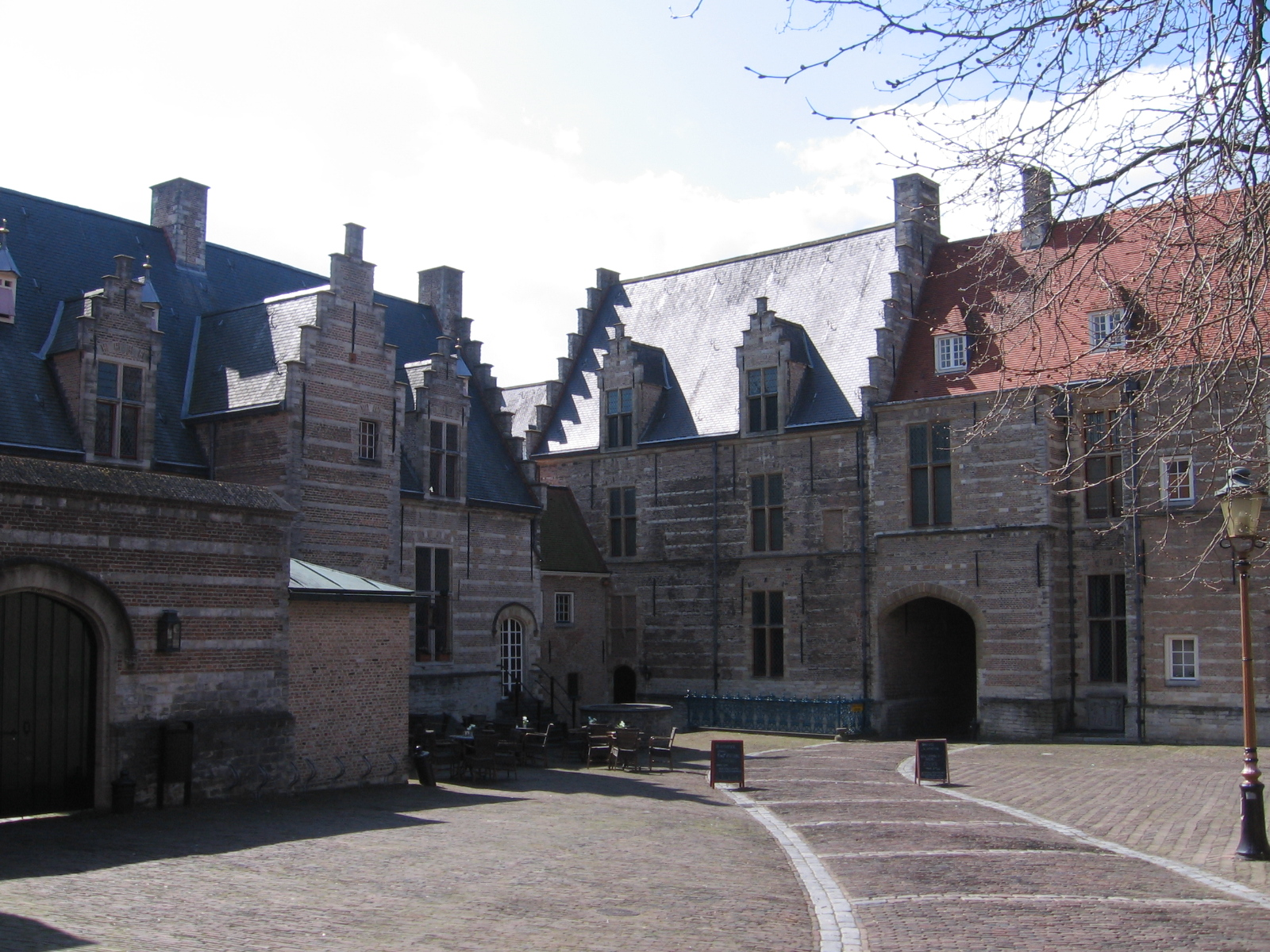 Markiezenhof Bergen op Zoom, 17 april 2006